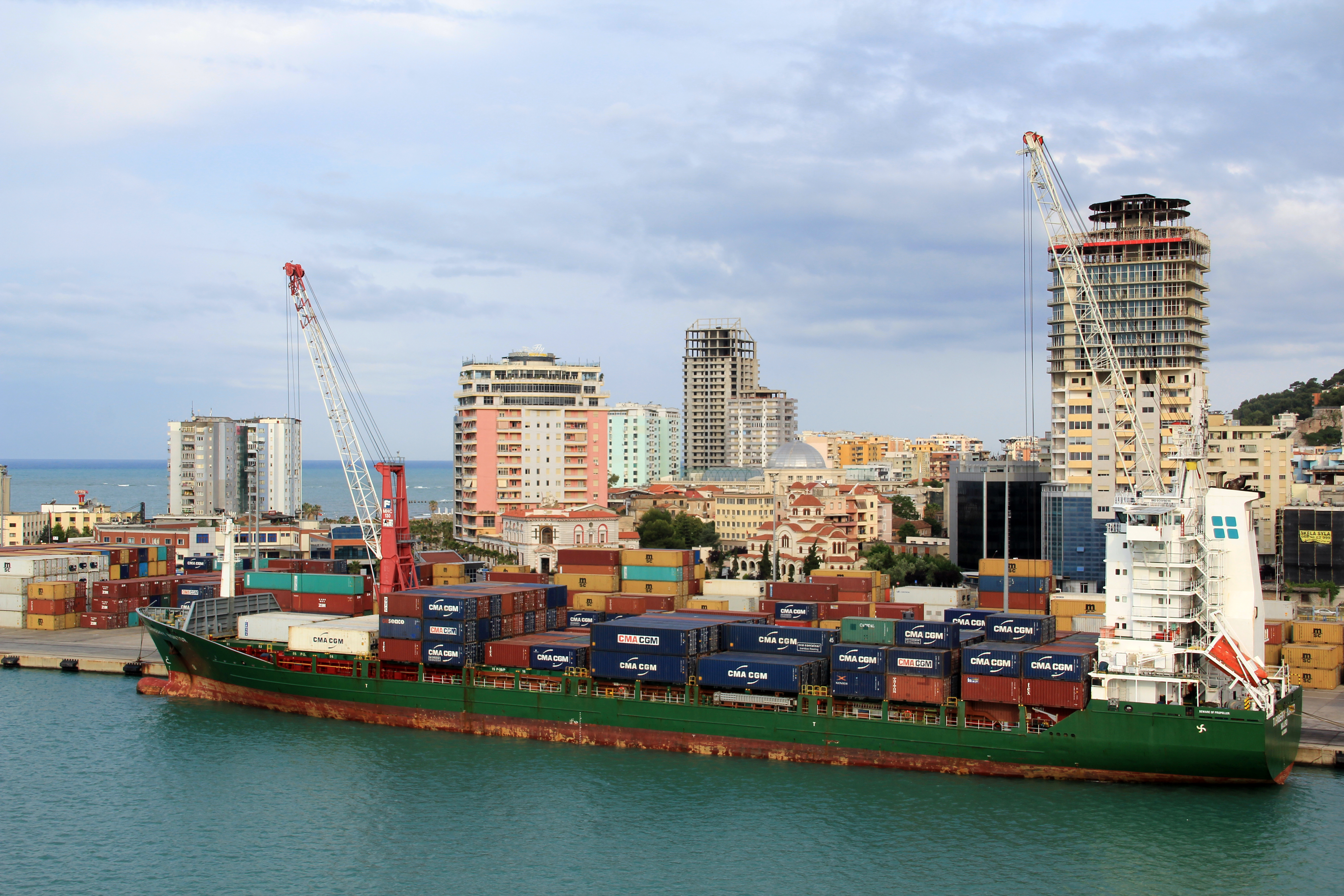 Il porto di Durazzo